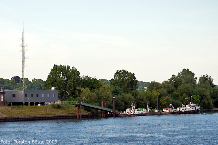 Der Anleger für die Lotsenversetzboote der Lotsenstation Seemannshöft befindet sich hinter der Lotsenstation im Köhlfleethafen.